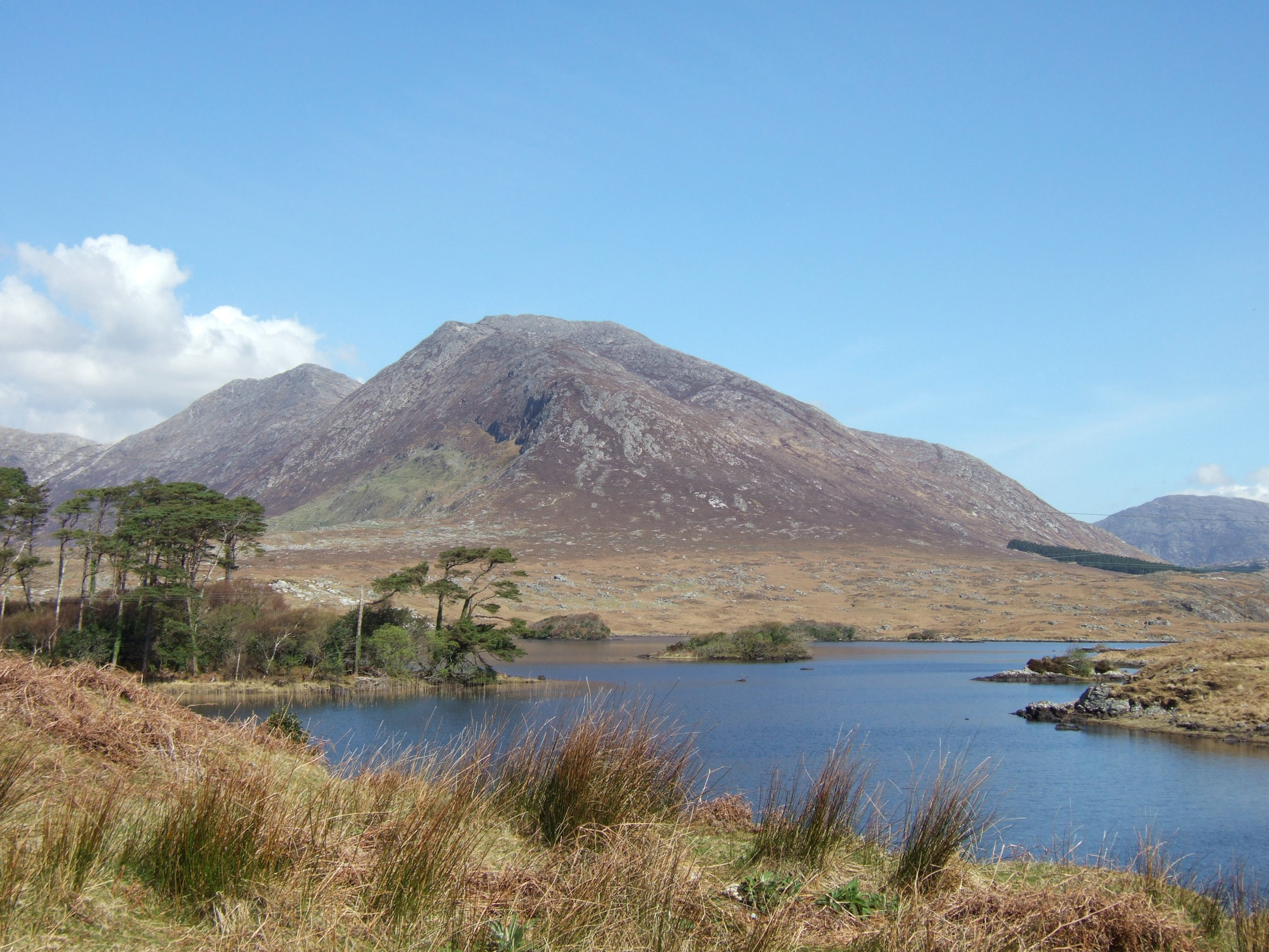 Conamara, Co Galway, Ireland